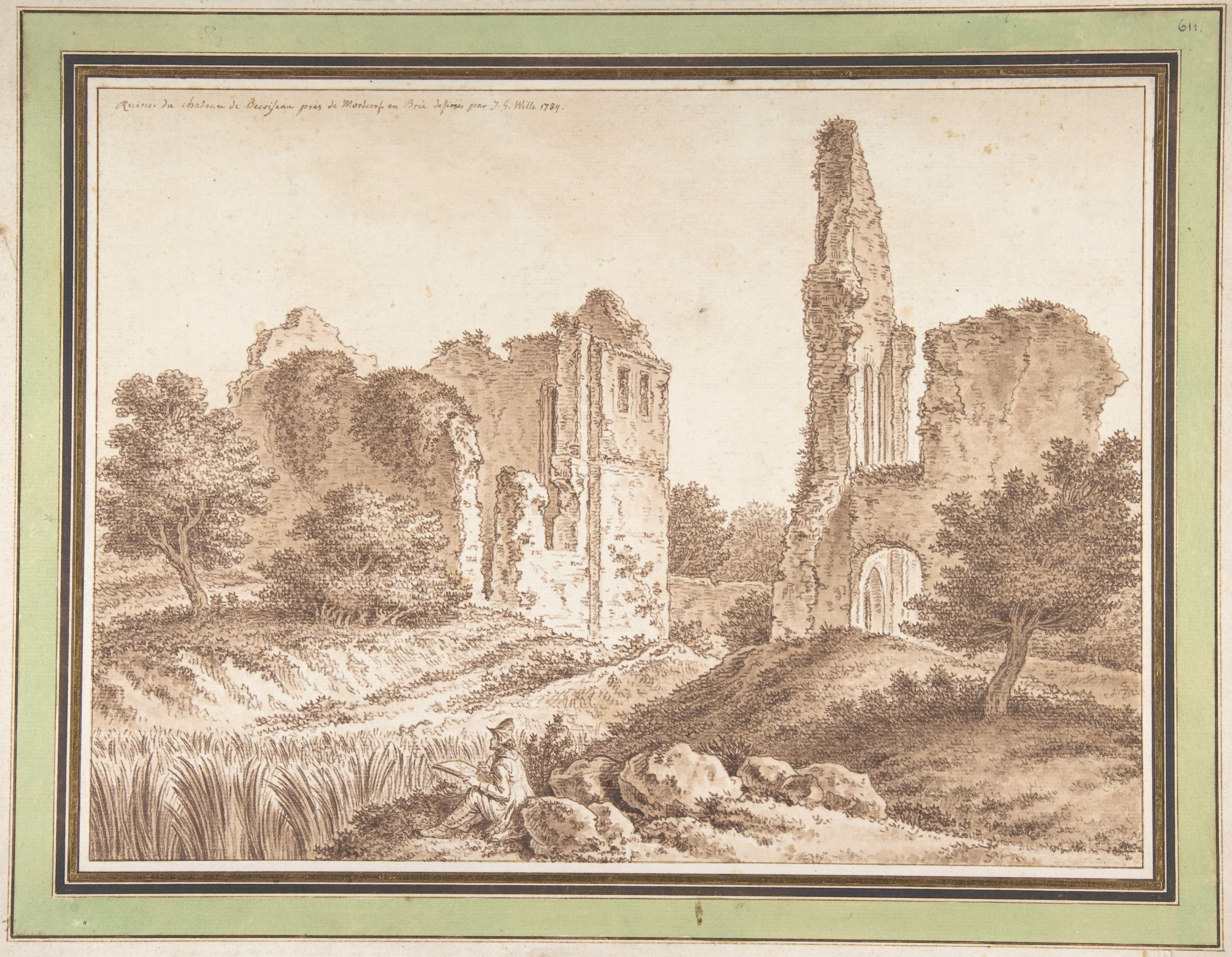 Drawing; Drawings